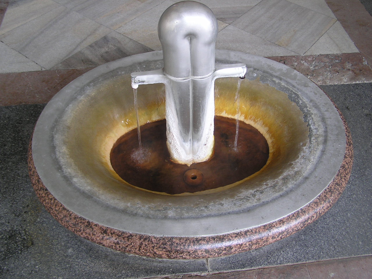 A water spring in Karlovy Vary